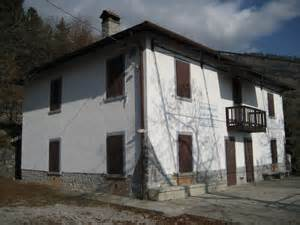 Rifugio Baita Grem - Val del Riso (Oneta-Gorno BG)